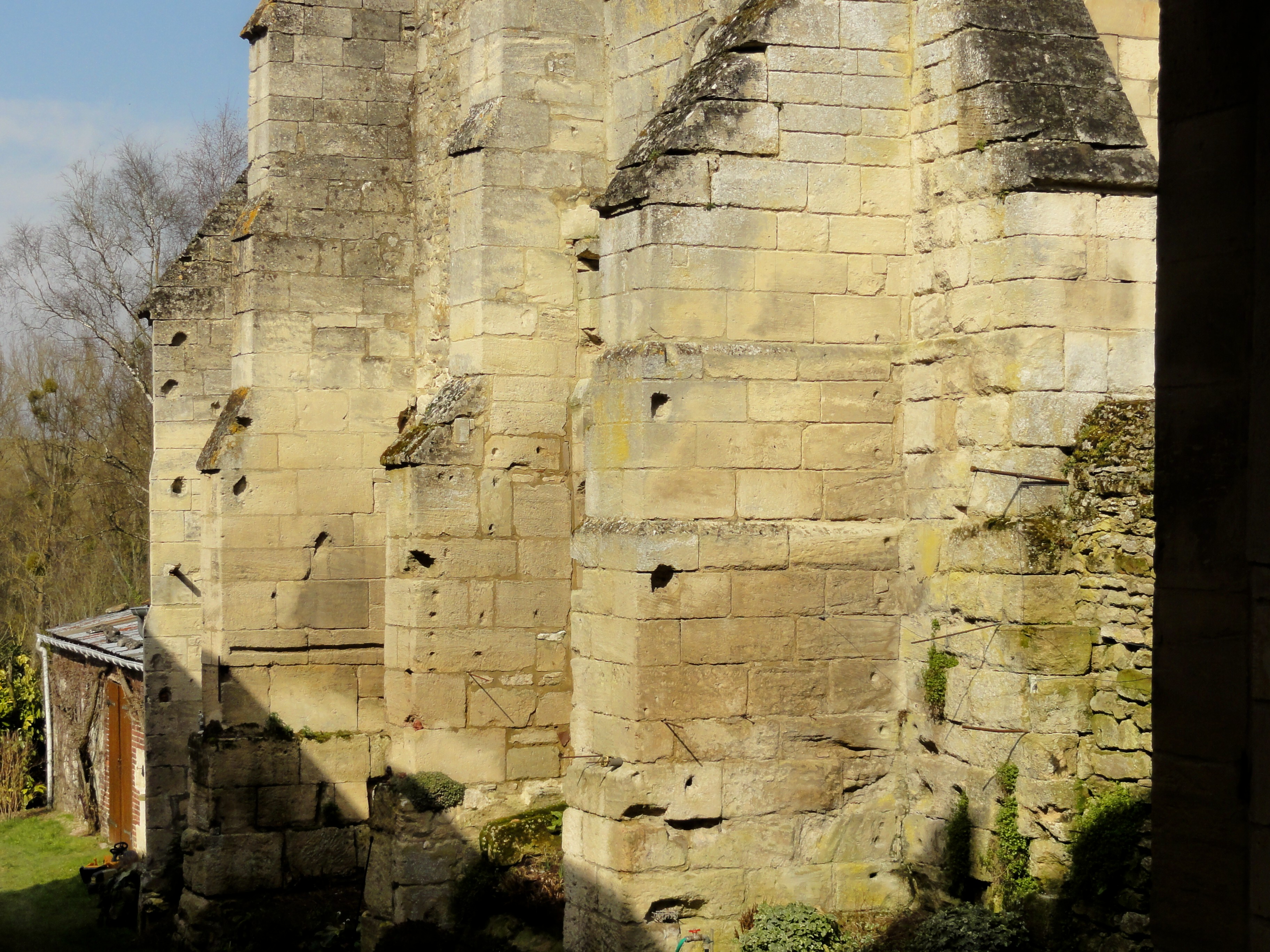 Soubassement du mur occidental, donnant sur une cour de ferme.